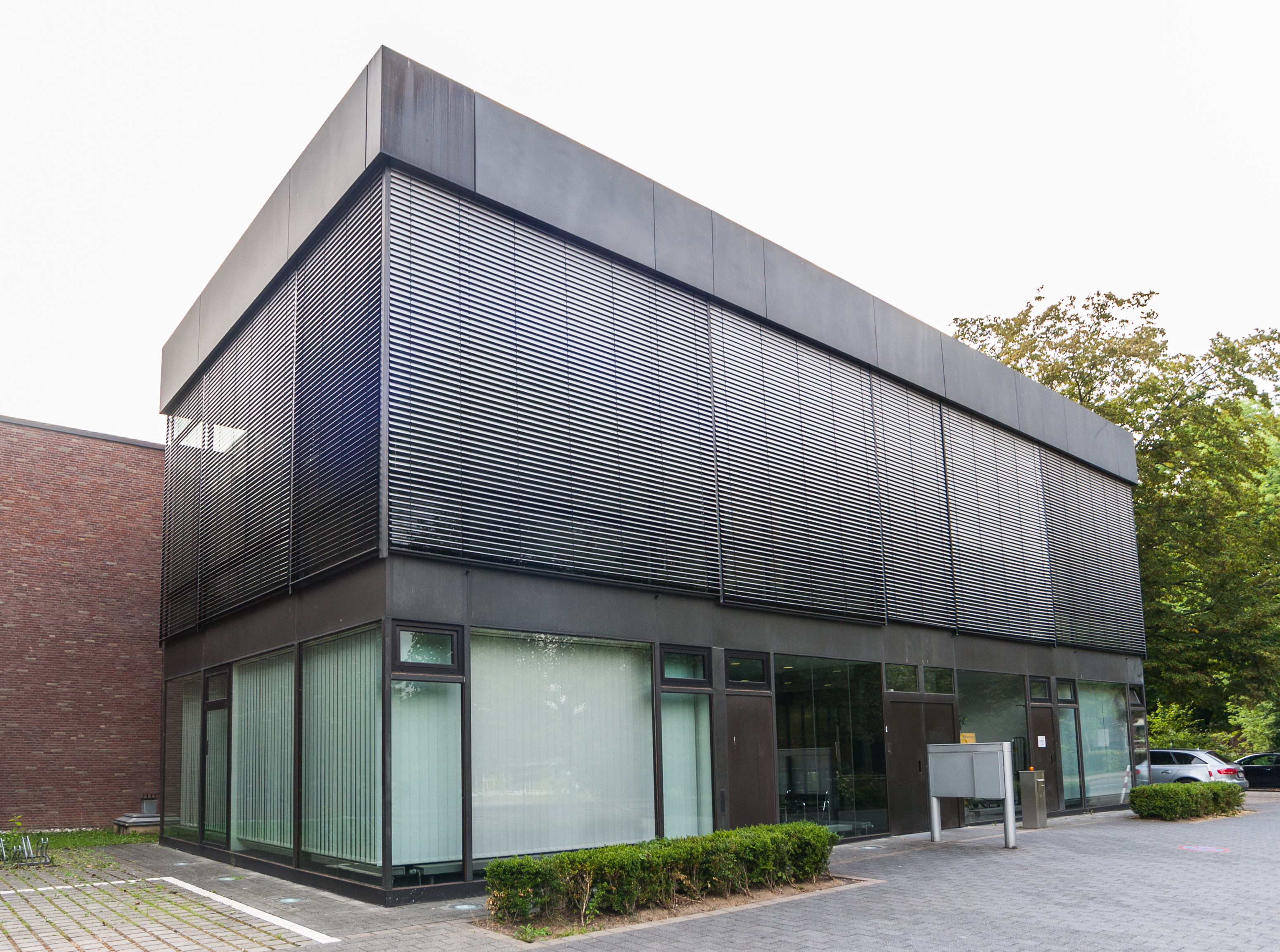 Gebäude der ehemaligen Niederländischen Botschaft, Sträßchensweg 10, Bonn